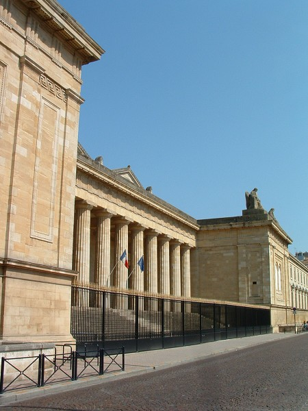 source